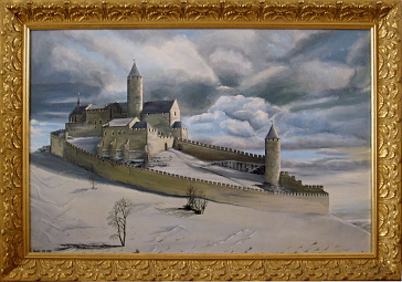 Hrad Bezděz, olej na plátně 125x92 cm